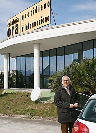 Sede di Calabria Ora, a Rende; il sindaco di Rende Bernaudo.